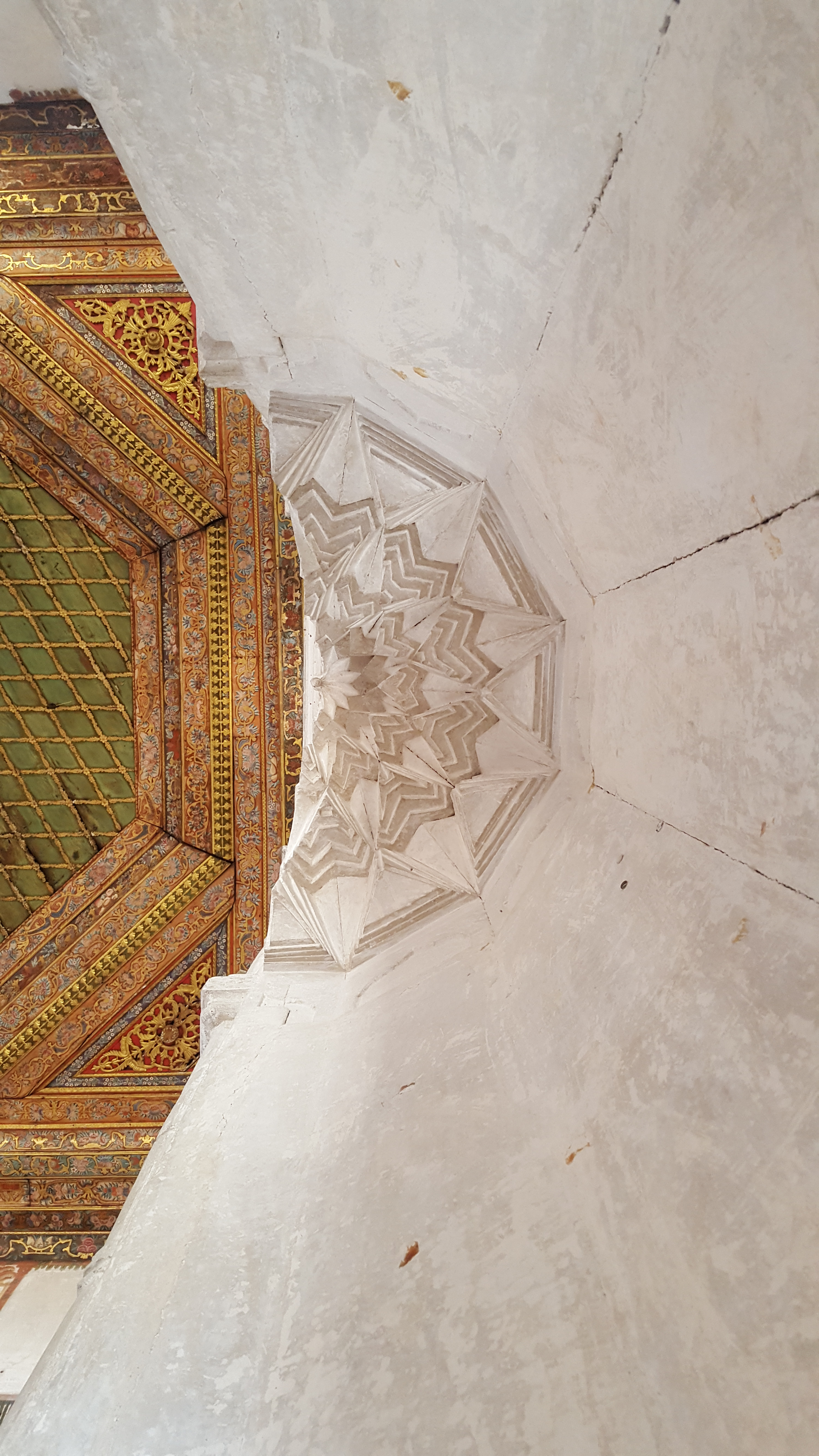 Teqeja Helvetive